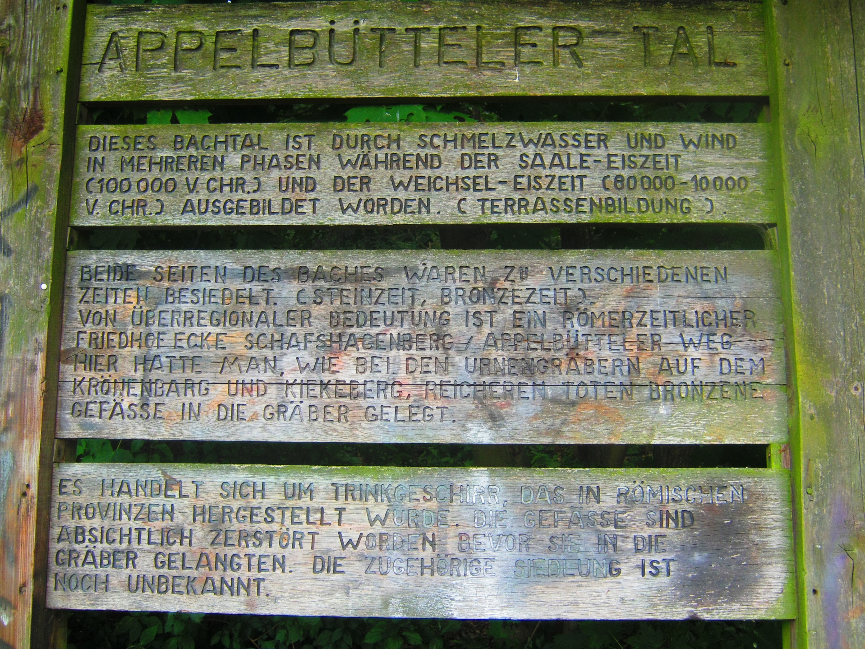 Informationstafel im Appelbütteler Tal in Hamburg-Marmstorf.